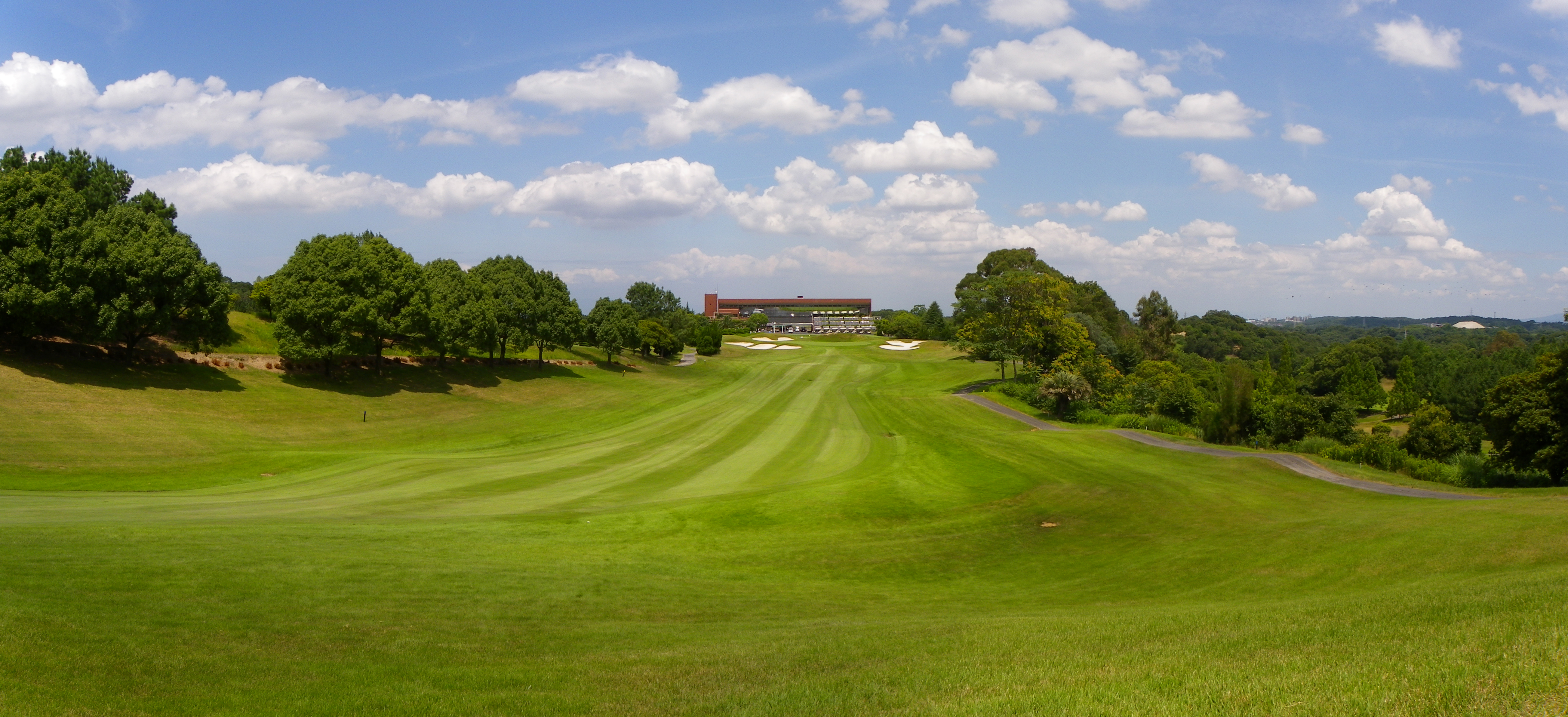 セカンド付近からグリーン、クラブハウス方向を望む。